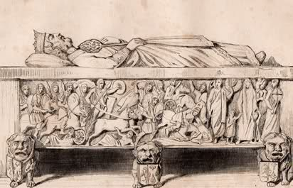 Tombeau de l'empereur Louis le Pieux, fils de Charlemagne, avant la Révolution française.